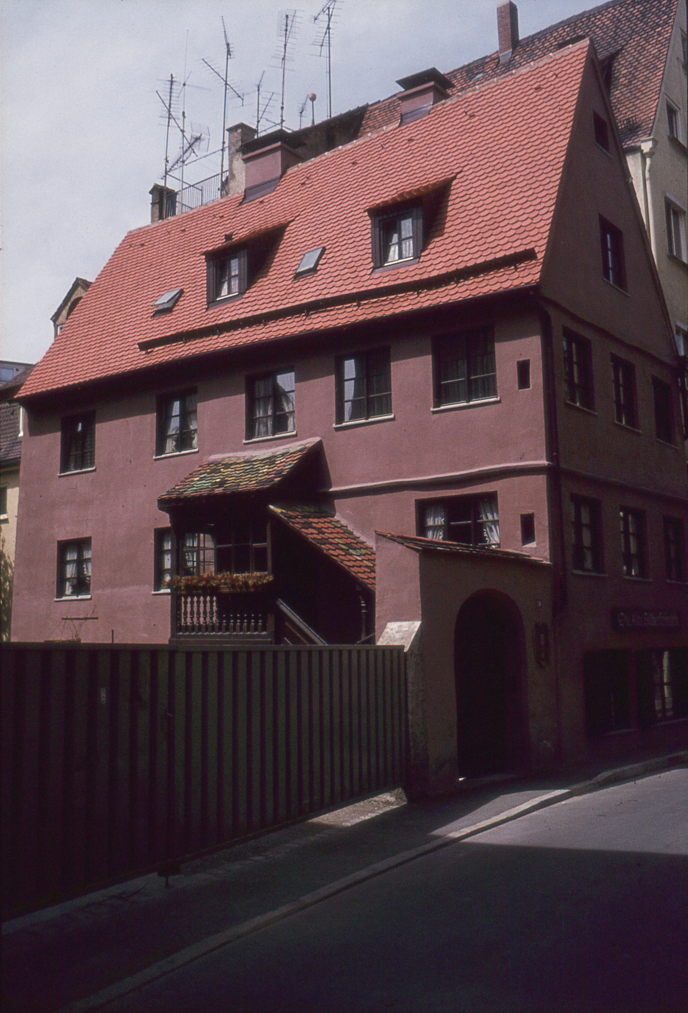 Historische Aufnahme der Alten Silberschmiede in Augsburg.